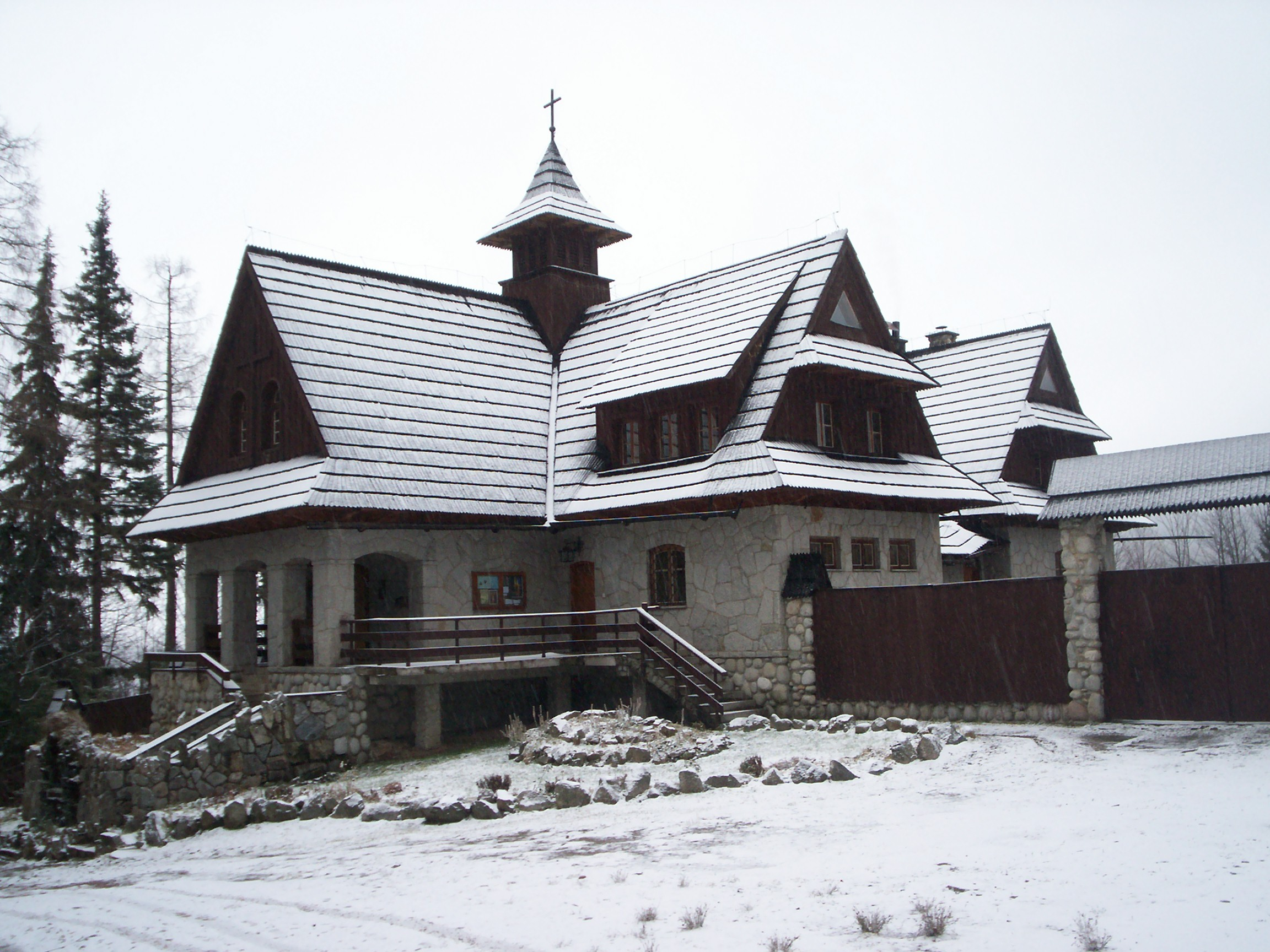 Zakopane, klasztor Zgromadzenia Braci Albertynów na Kalatówkach.